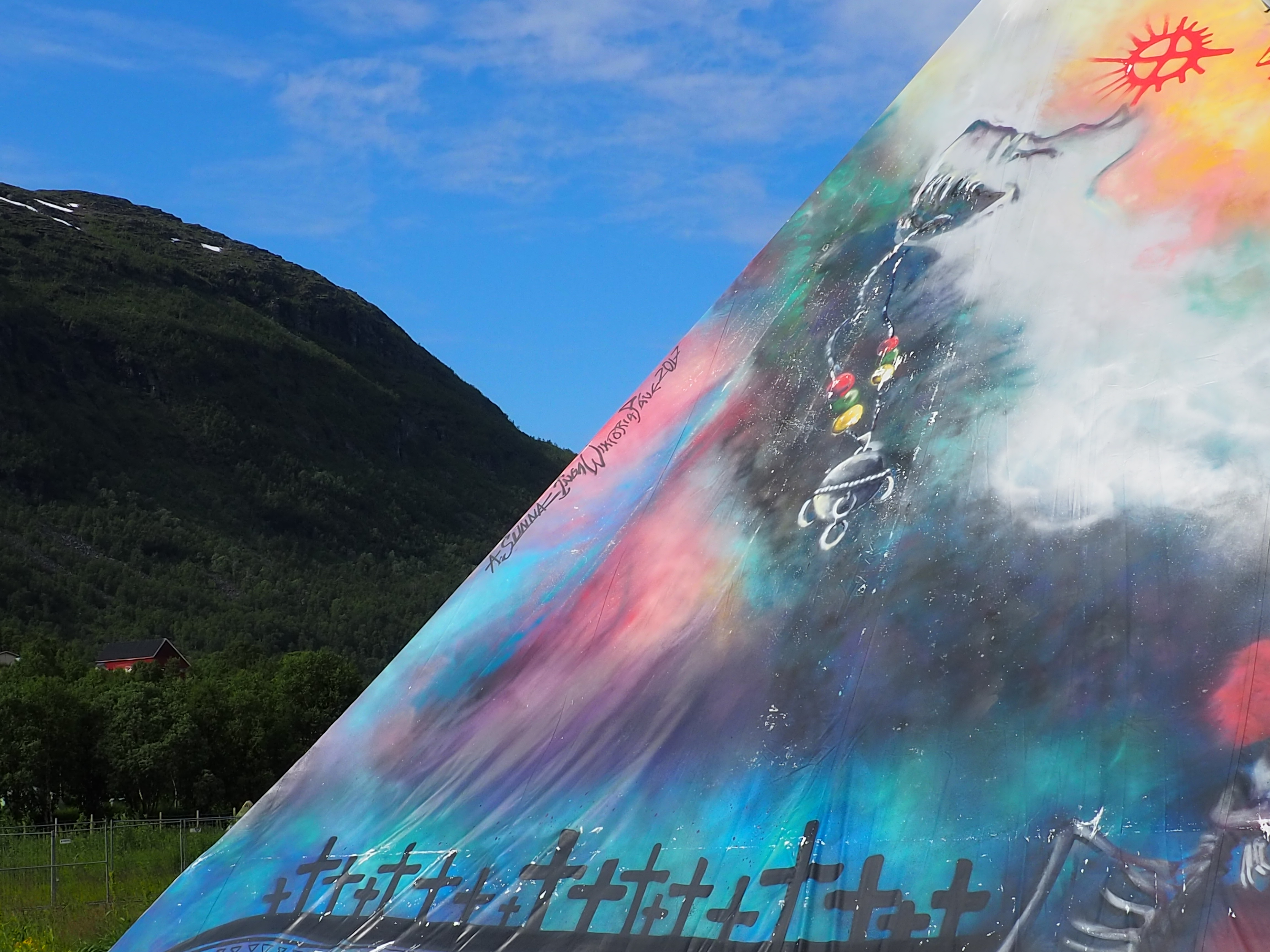 Lavvo med kunst på Riddu Riđđu 2019